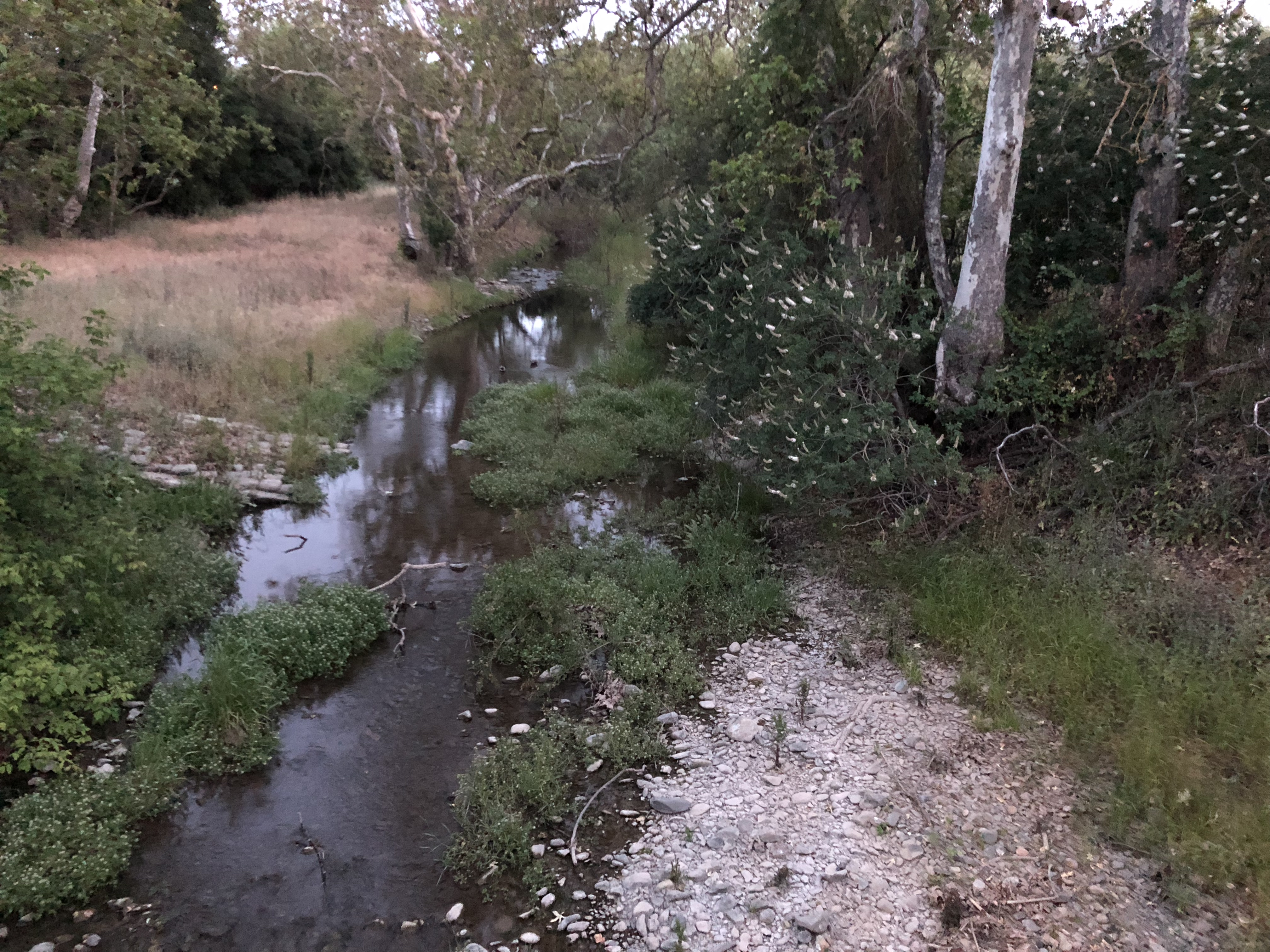 Los Alamitos Creek Trail